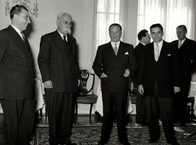 Tito sa najstarijim herojem Đokom Pavićevićem